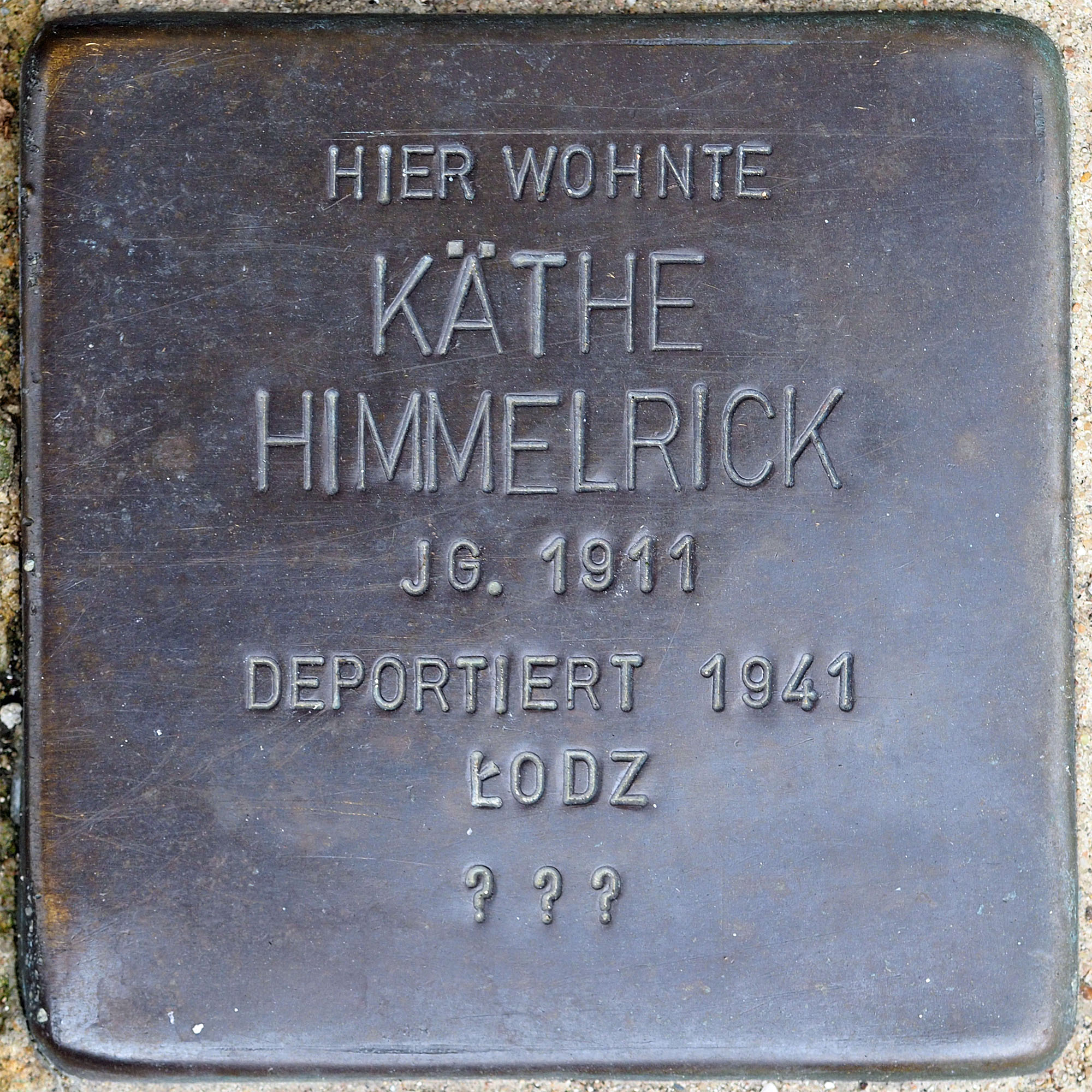 Stolpersteine MG: Himmelrick, Käthe